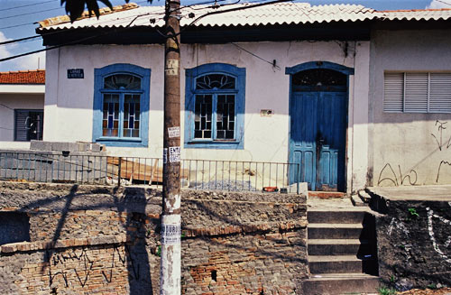 Esta casa foi construída no início do século XX pelo senhor Luís Ribeiro, morador do bairro há tempos e, até os dias atuais, pertence a família Ribeiro.